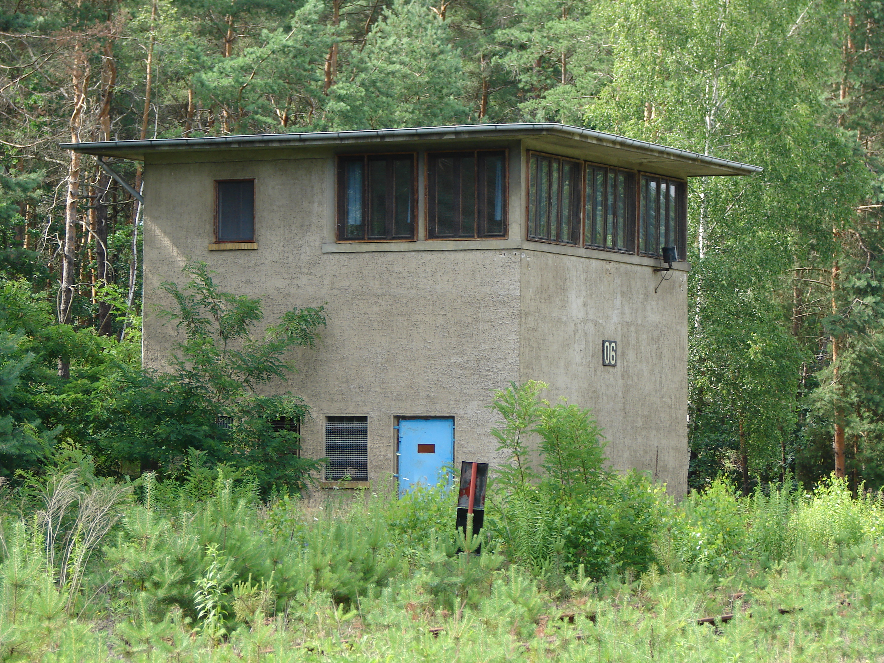 Altes Stellwerk der Grubenbahn vom Tagebau Golpa-Nord